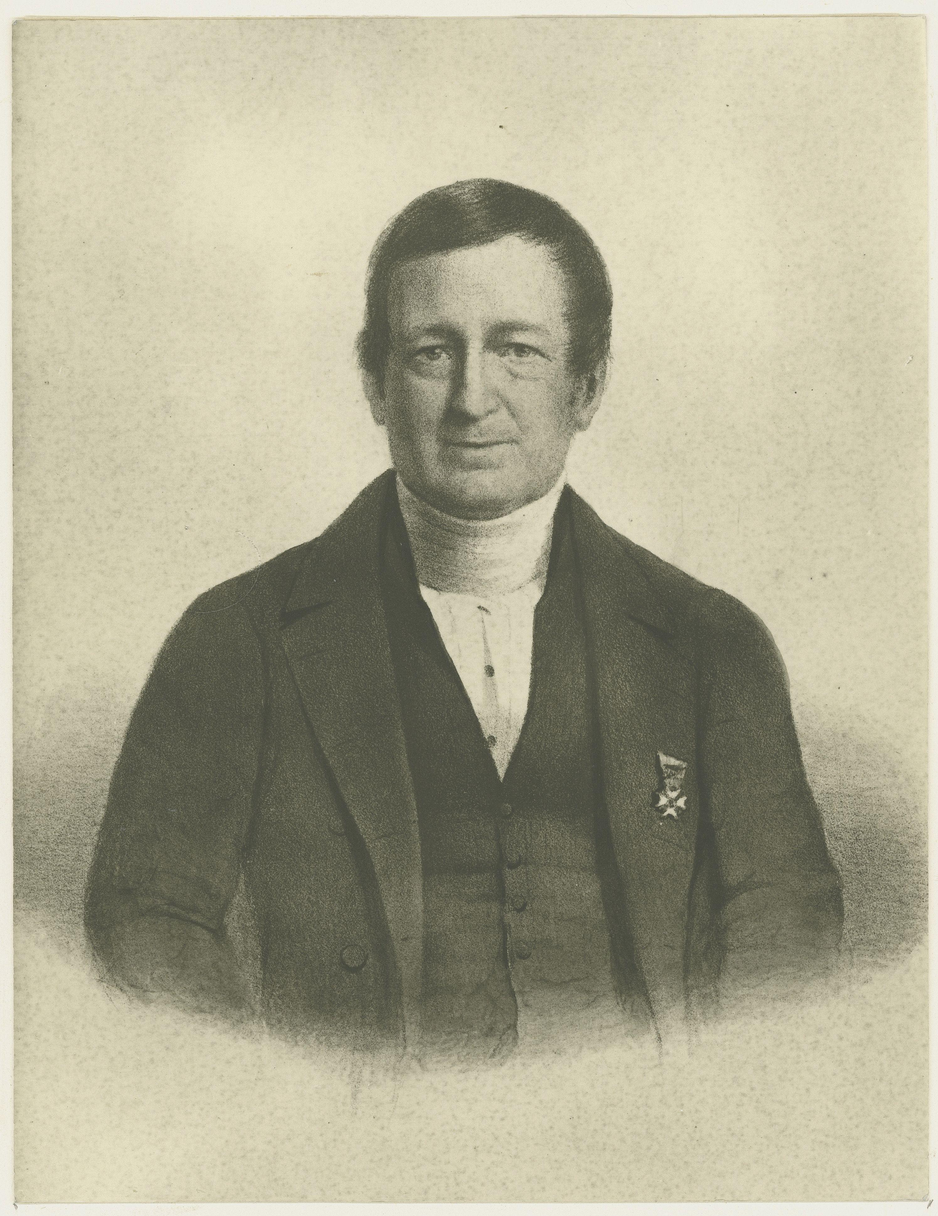 Paul du Rieu (1791-1857). Burgemeester van Leiden. Foto van litho.